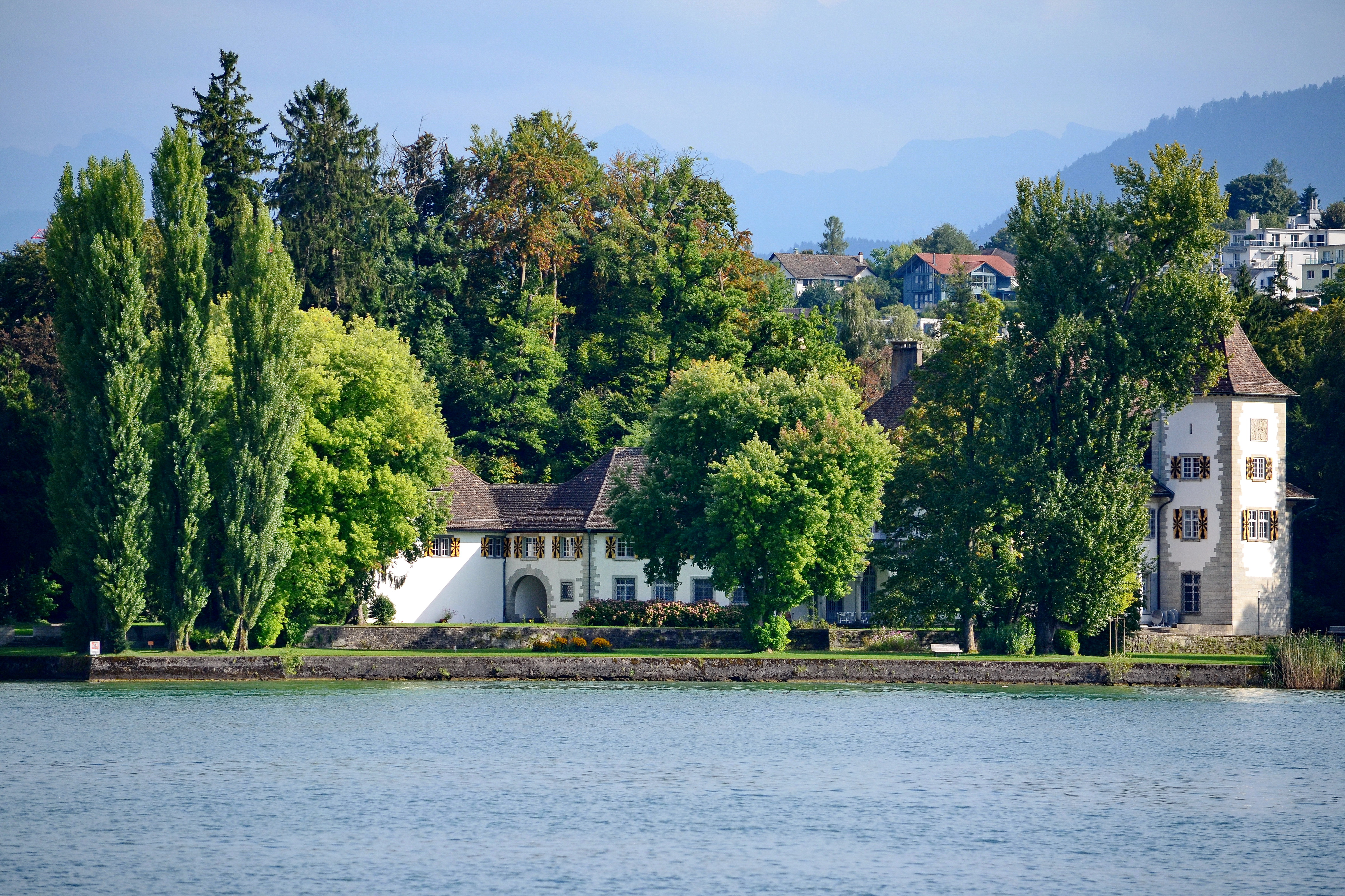 Au peninsula and Werdmüller estate in Au as seen from Zürichsee-Schiffahrtsgesellschaft (ZSG) paddle steamer Stadt Rapperswil on Zürichsee in Switzerland